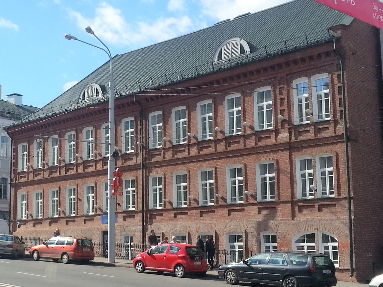 Беларуская (тарашкевіца): Будынак былой гарадзкой вучэльні. г. Віцебск This is a photo of Belarusian heritage monument. Reference number: 213Г000048 ( WLM)